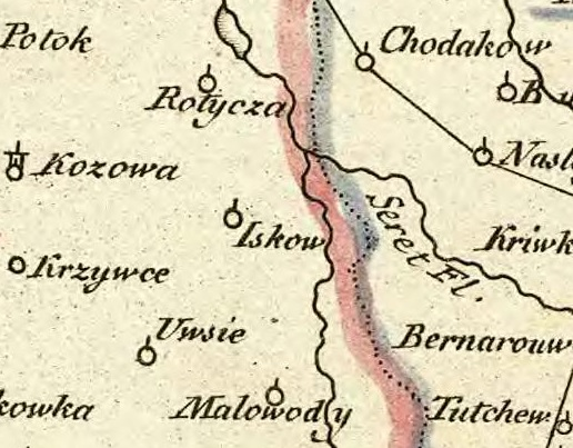 Вівся на на австрійській мапі Atlas der Königreiche Galizien und Lodomerien : bestehend in einer general Karte dieser beiden Königreiche, [...] nebst dem districkt Bukowina [...] 1790 р.